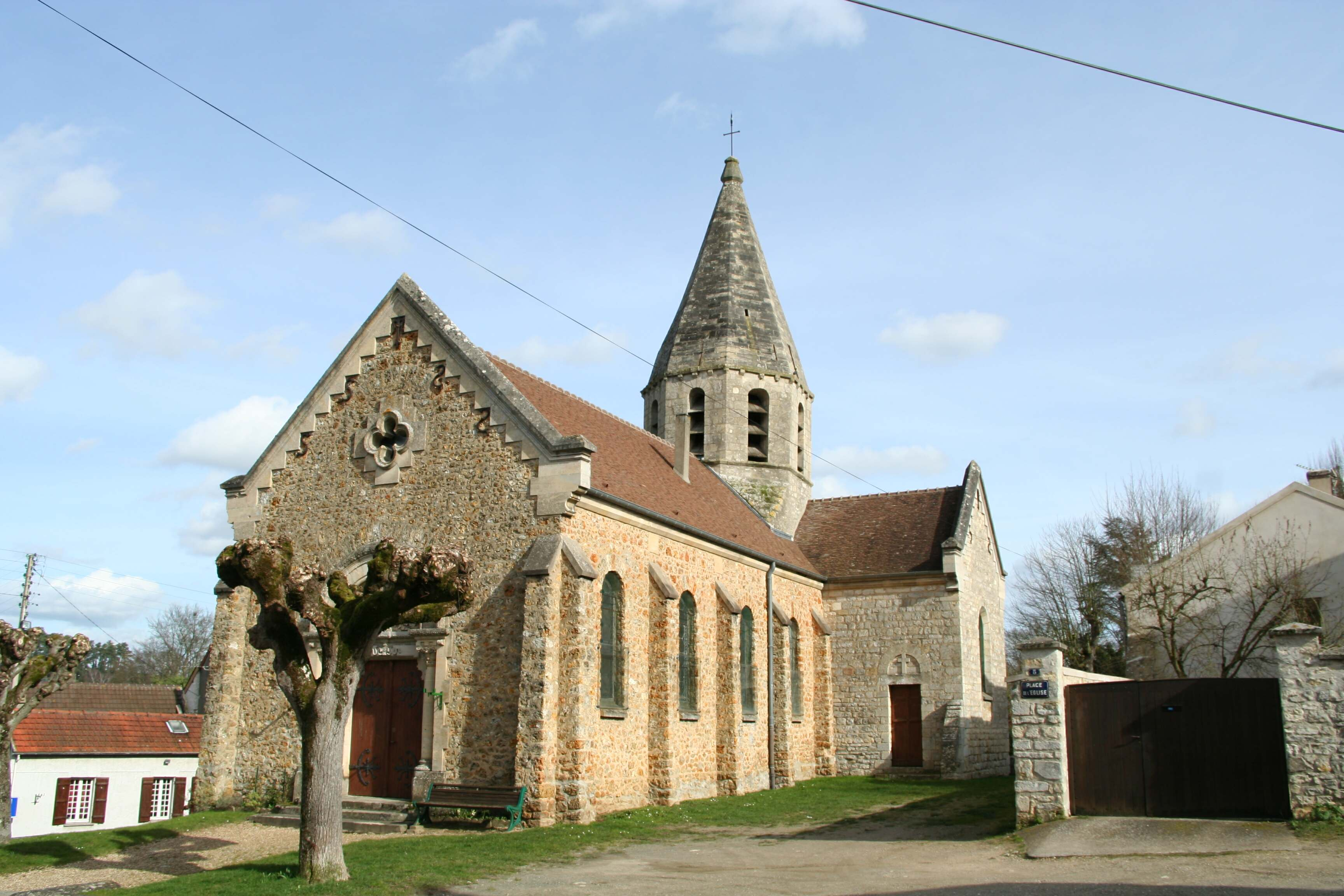 Église de Brueil-en-Vexin - Yvelines (France)